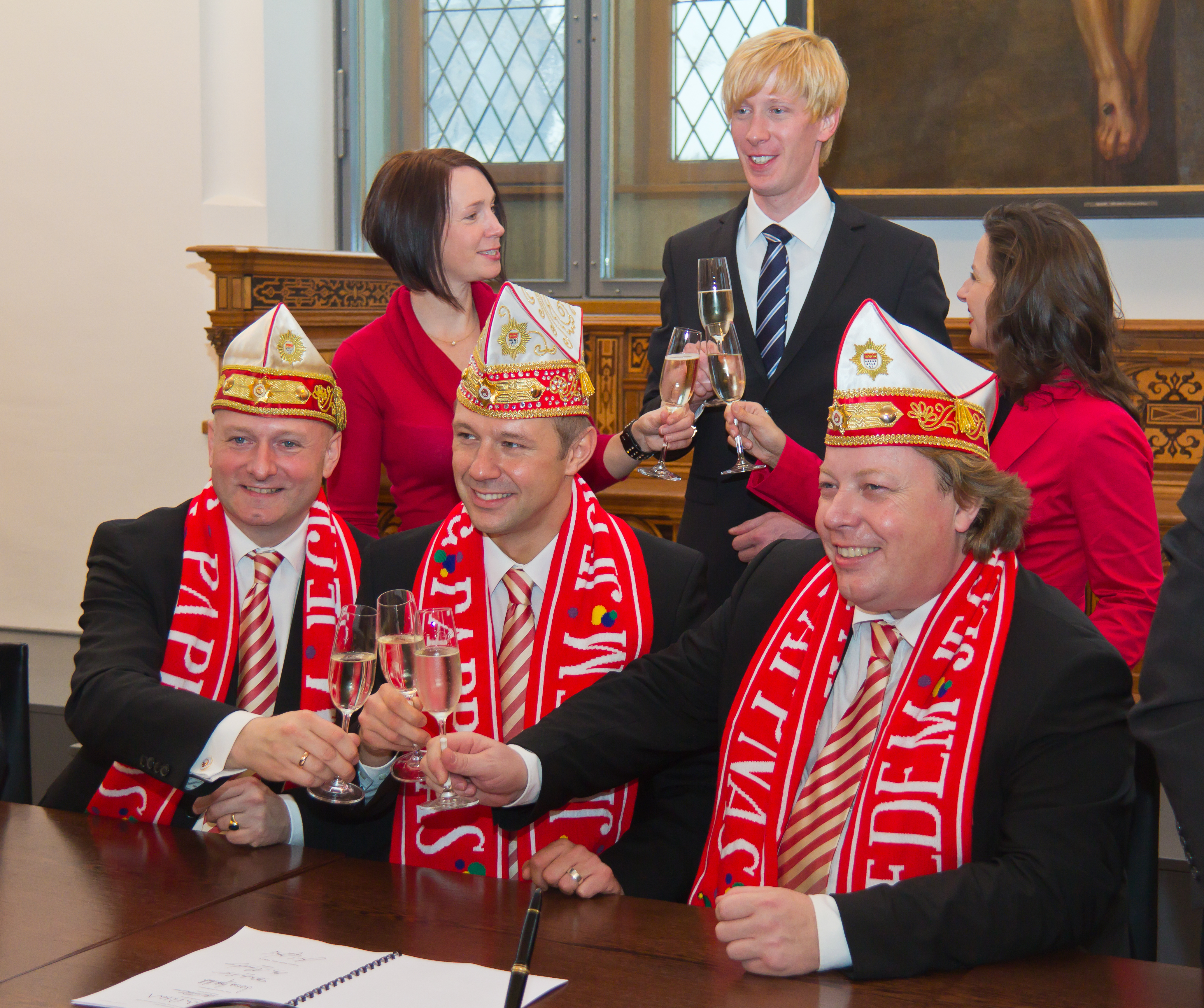 Das Kölner Dreigestirn unterzeichnete den Sessionsvertrag mit OB Jürgen Roters im Senatssaal des Historischen Rathauses von Köln. Es stoßen miteinander an: sitzend von links: Dr. Oliver von Rosenberg („Jungfrau Olivia“), Marcus Gottschalk („Prinz Marcus II.“), Thorsten U. Schmidt („Bauer Thorsten“)